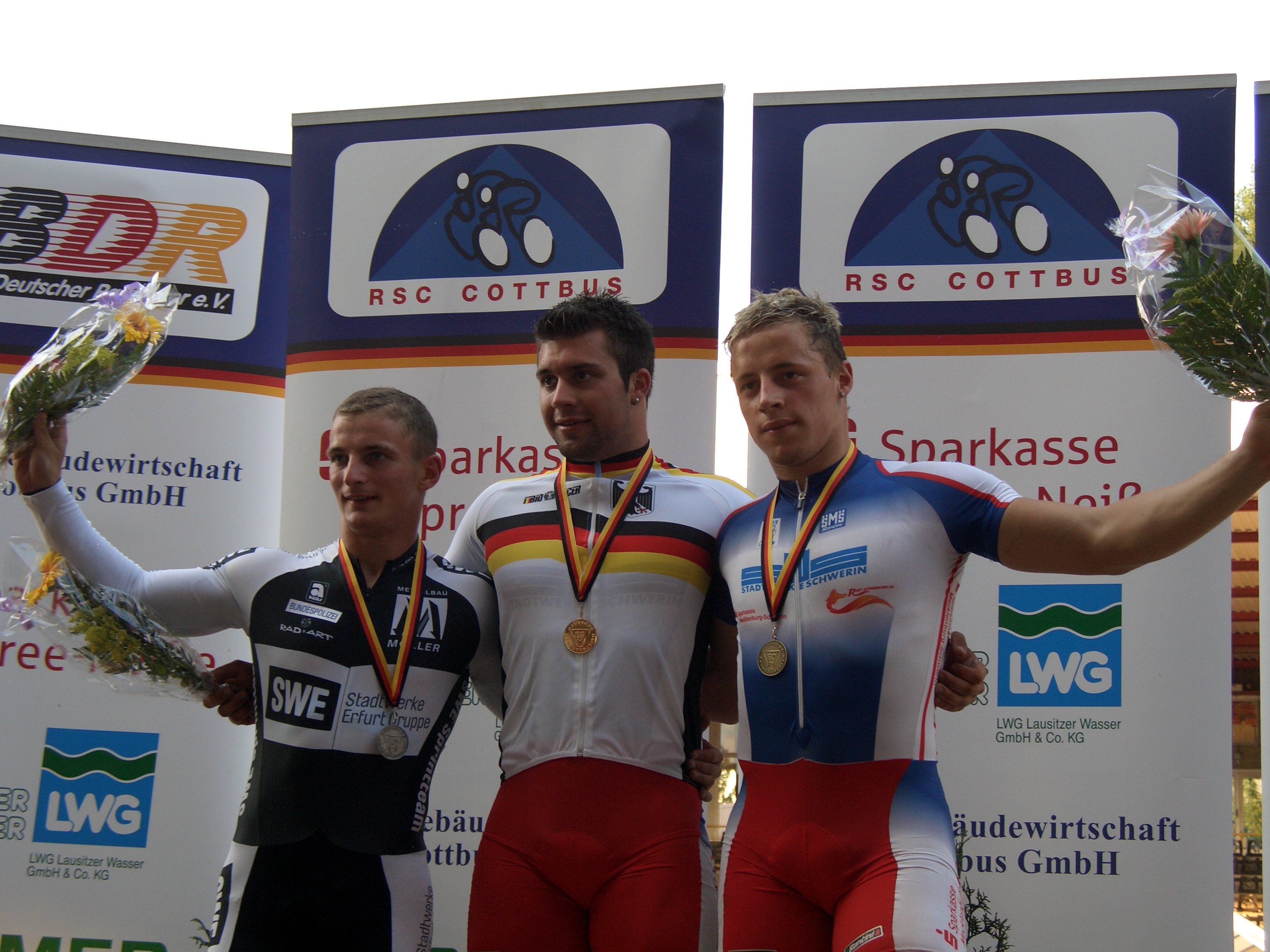 Bahn-DM 2010 Cottbus, Siegerehrung im Keirin, v.l.n.r.: René Enders, Tobias Wächter, Marc Schröder